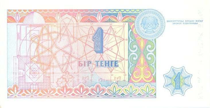 1 тенге 1993 года